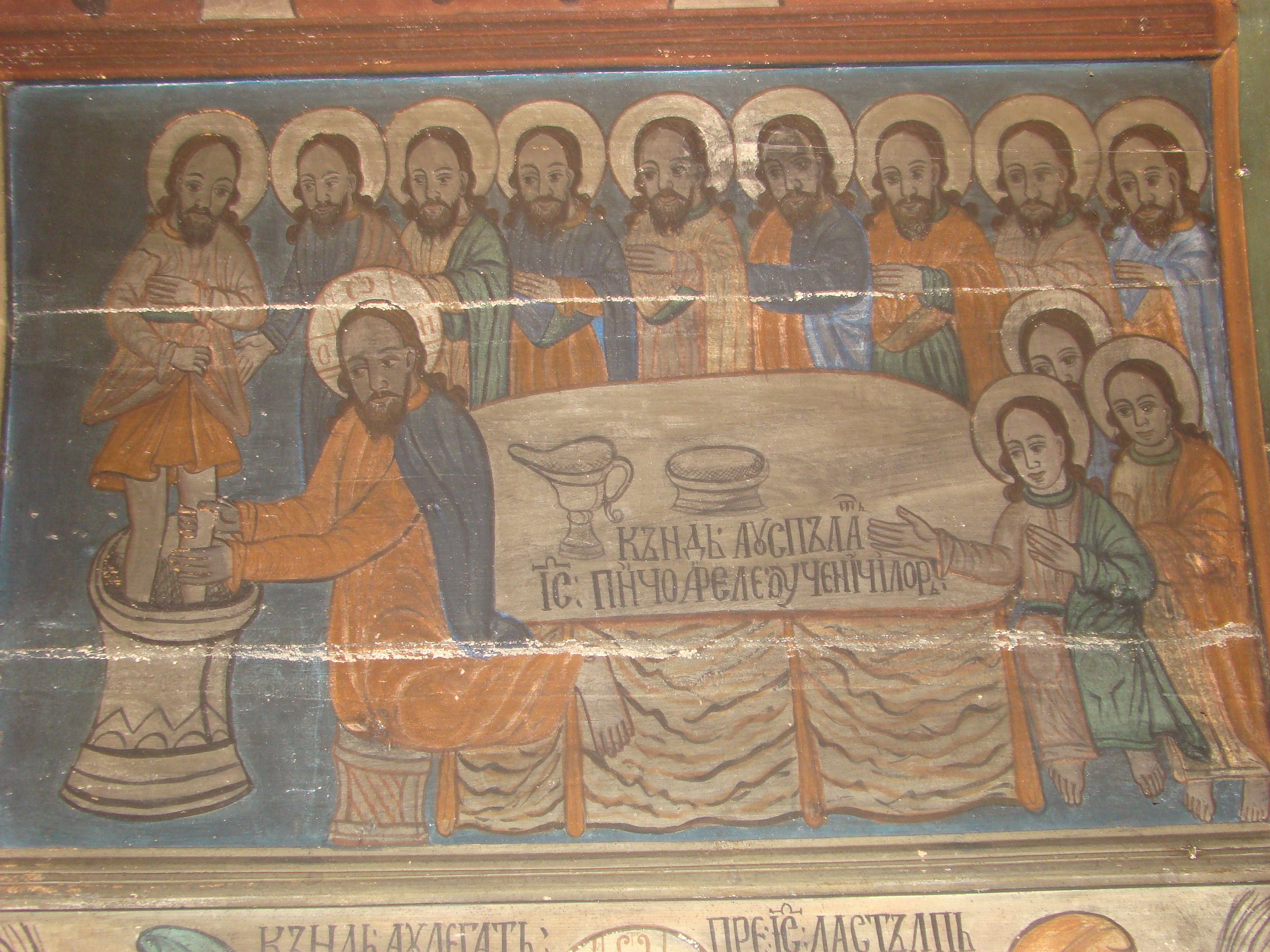 Biserica de lemn „Sfinții Arhangheli” din Botean, județul Bihor